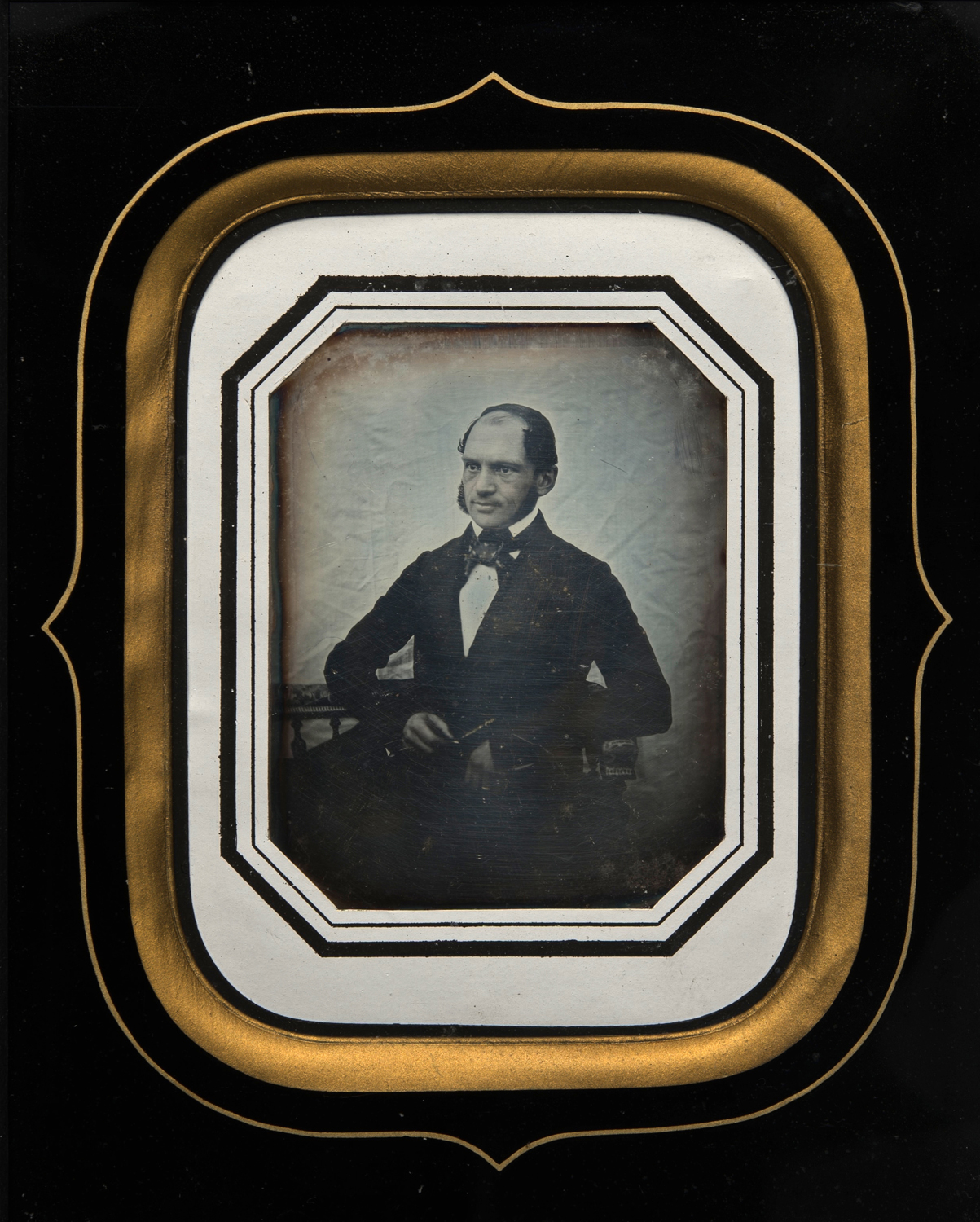 Seni teadaolev vanim Eestis tehtud dagerrotüüp. Autor oli arvatavasti Charles Borchardt. Fotol on Tallinna raehärra Alexander Hoeppener u 1850. aastal. Dagerrotüüp kuulub Järvamaa muuseumi kollektsiooni. Daguerreobase:PM_F22 1850 MUIS:PM F 22